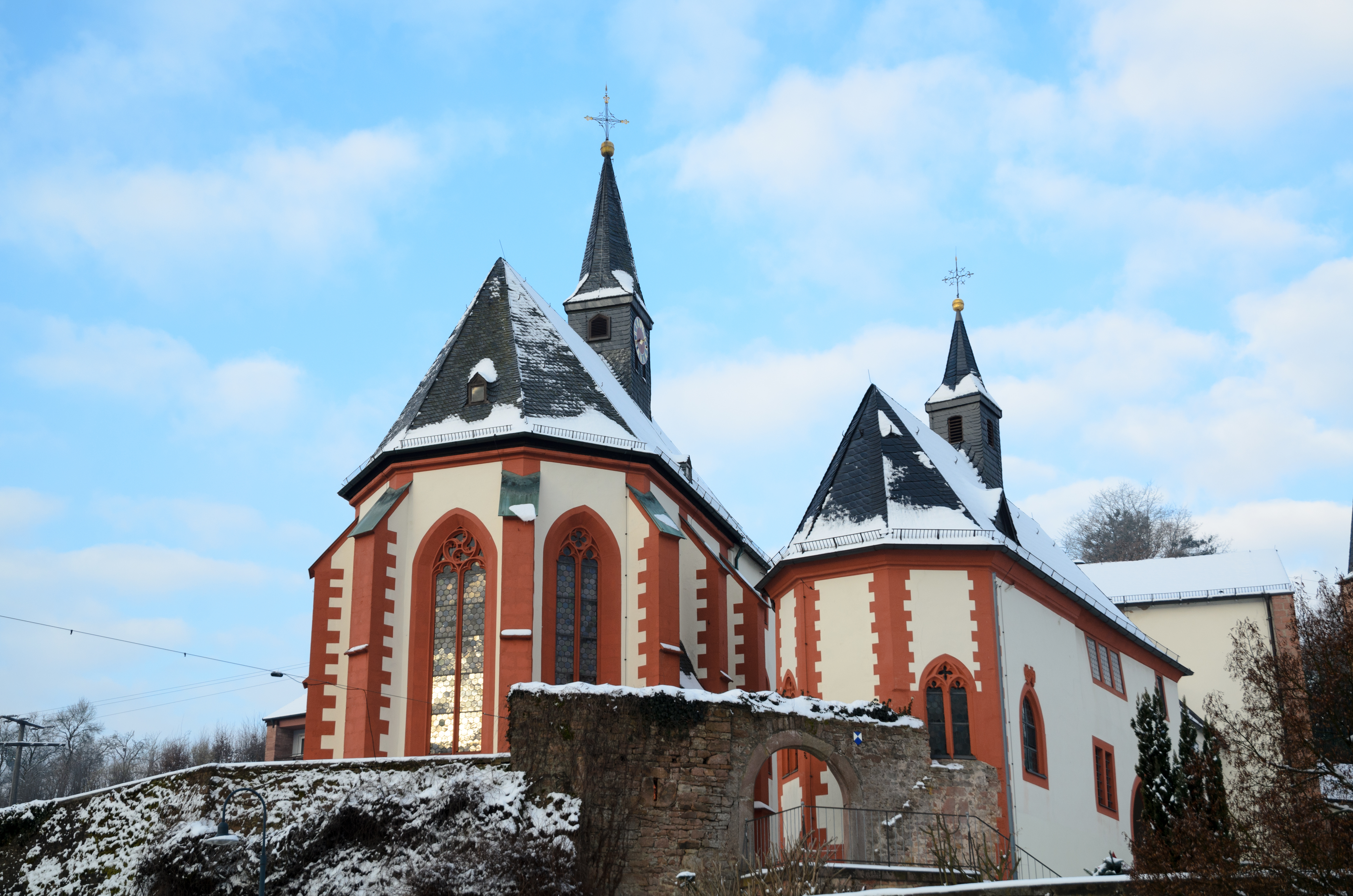 Wallfahrtskirche Hessenthal